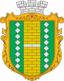 Герб смт Наркевичі